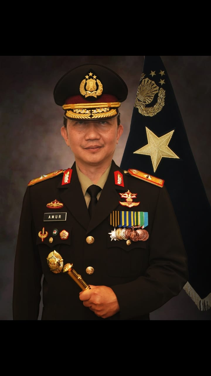 Brigjen. Pol. Amur Chandra Juli Buana S.H., M.H.